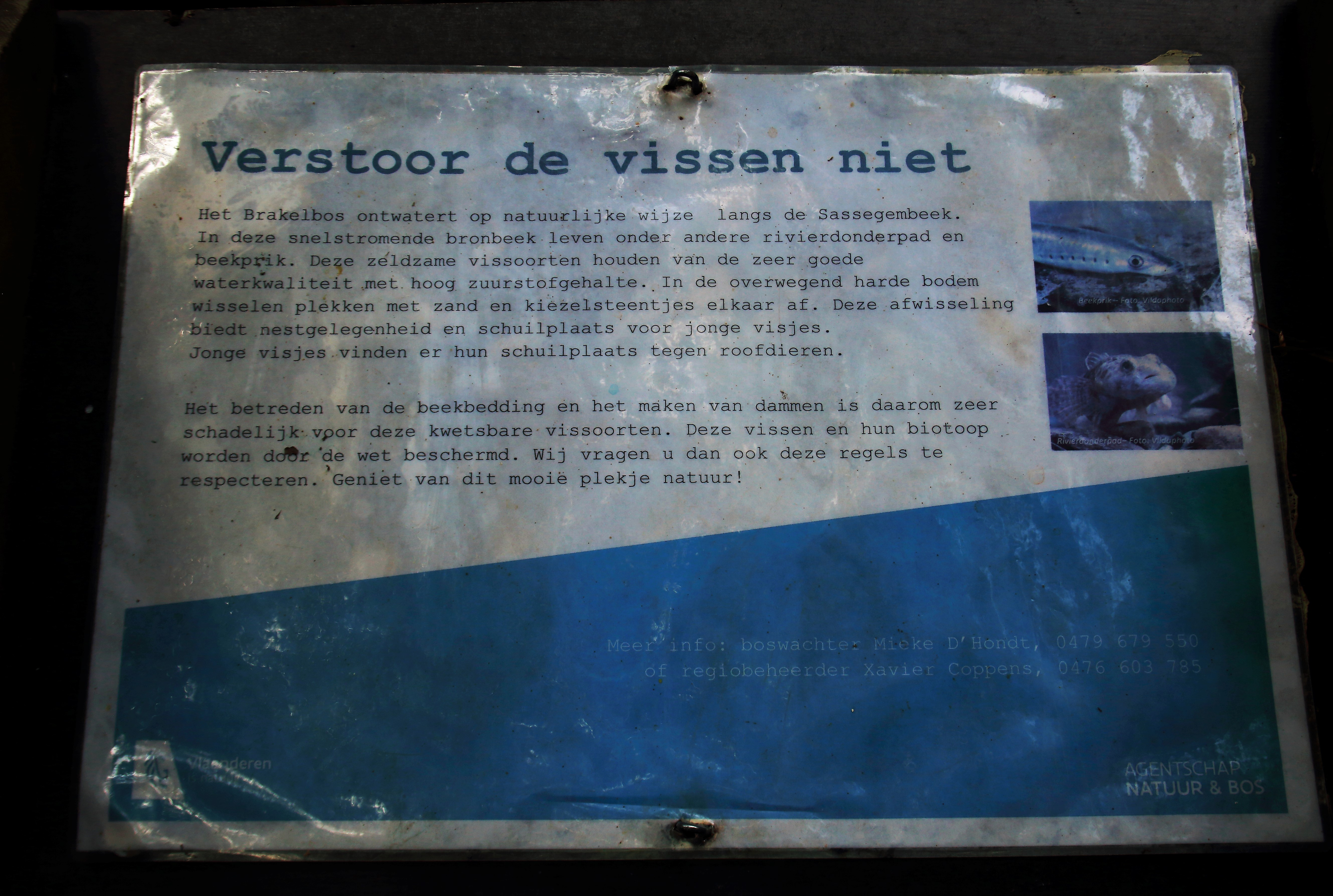 Brakelbos, Brakel, Vlaanderen, België